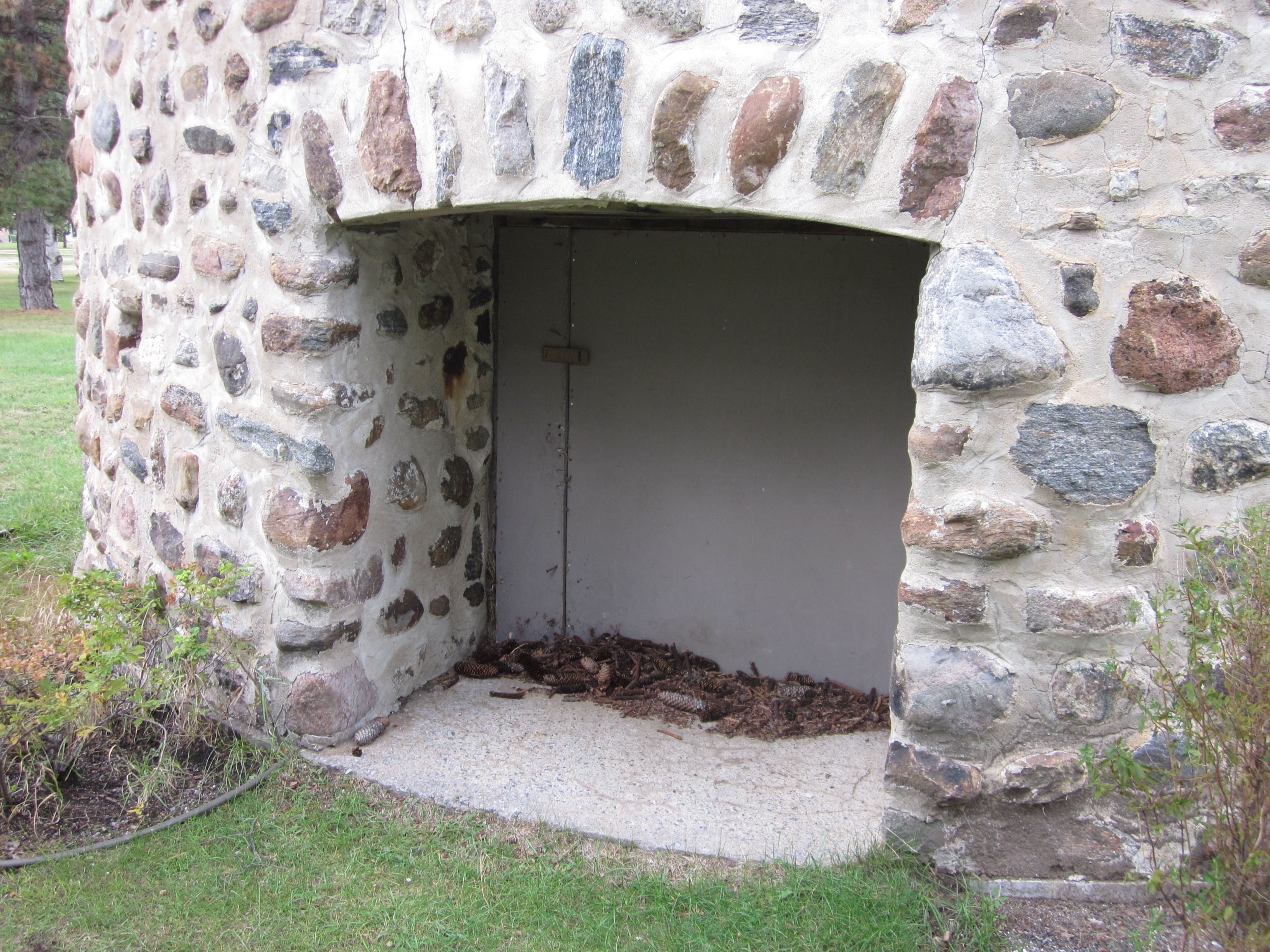 Moulin à vent de Trois-Rivières, 3351, boulevard des Forges, Trois-Rivières (Canada). (Protection MH classé. Voir la liste des lieux patrimoniaux de la Mauricie pour plus de détails).